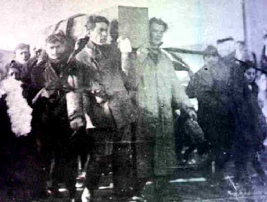 Entierro del obrero Gracián, muerto durante la primera huelga.